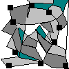 soil structure: Polyedergefuege